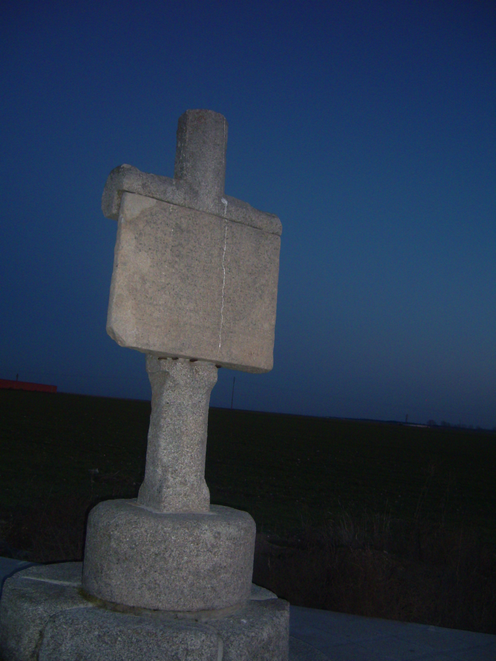 Cruz del Reto (monumento en la provincia de Ávila)